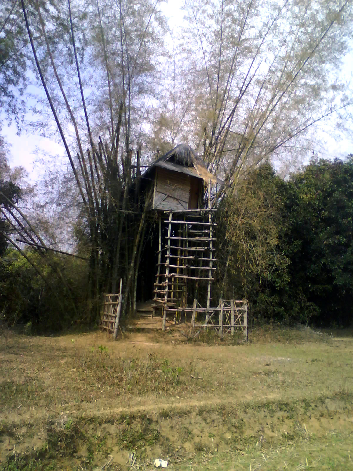 പാക്കത്തെ ഒരു ഏറുമാടം